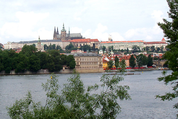 Moldau mm in Prag